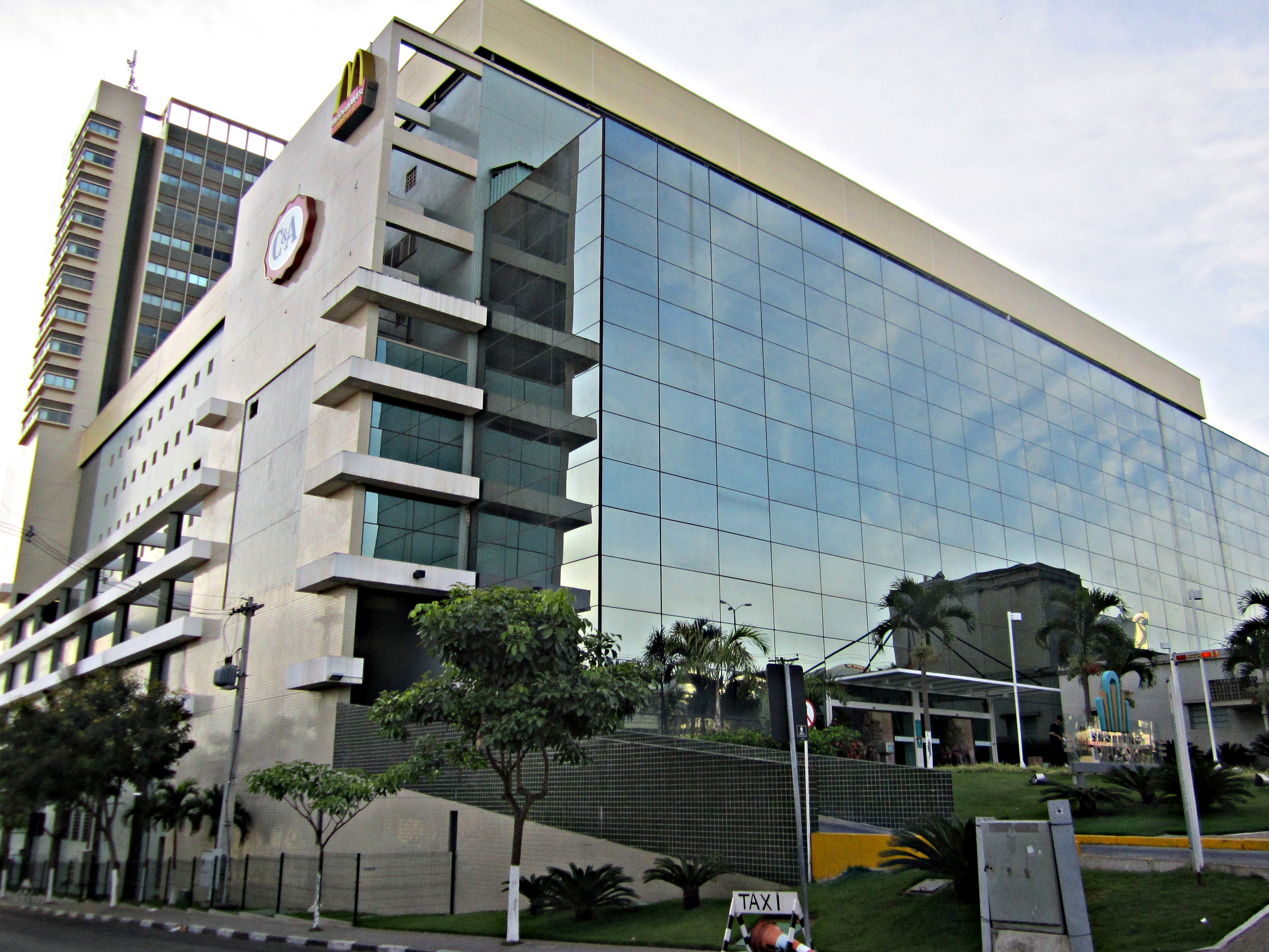 Shopping Difusora - Caruaru - Pernambuco - Brasil